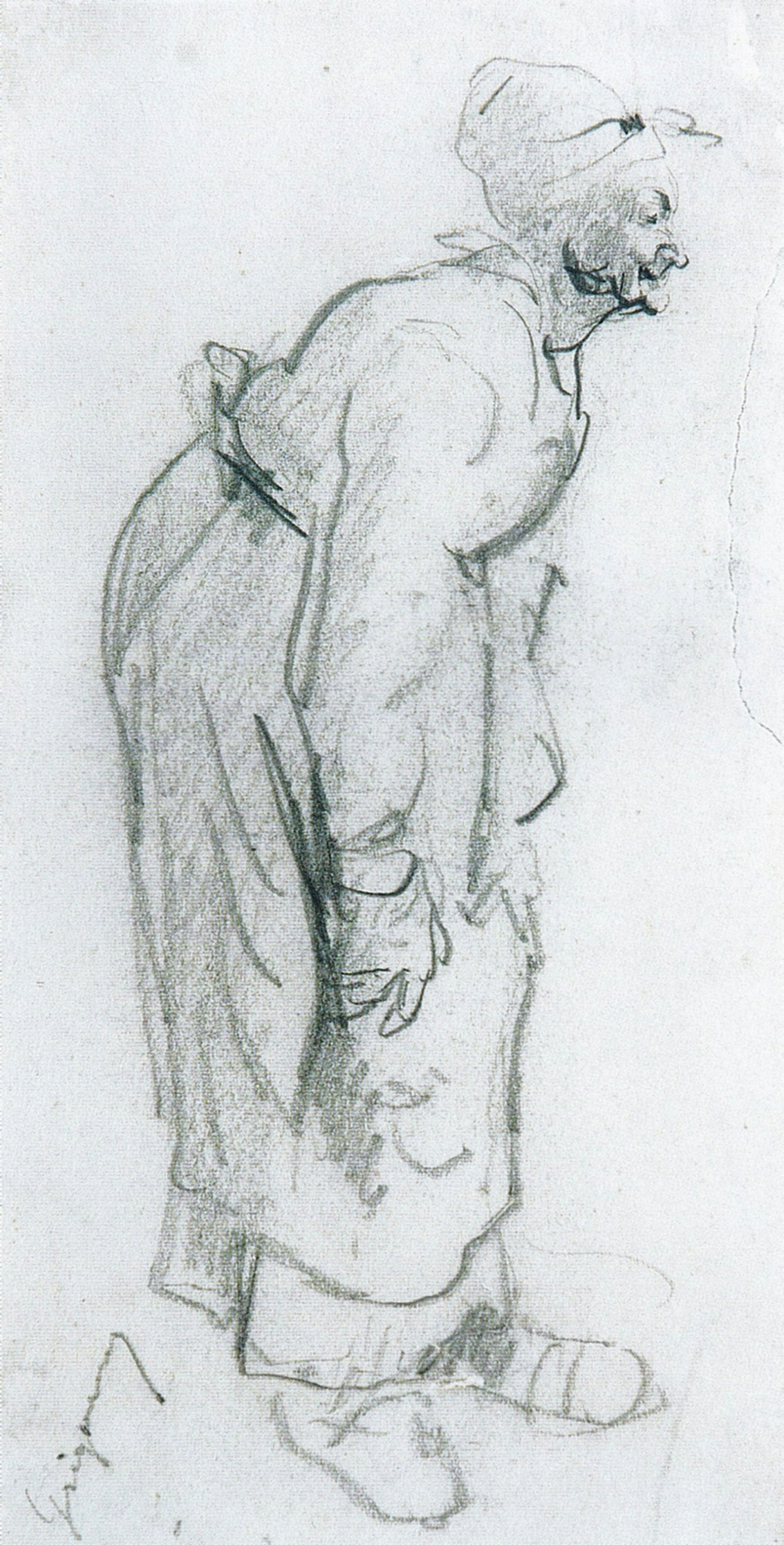 Studiu de bătrână cu gâștele - Muzeul Național de Artă al României